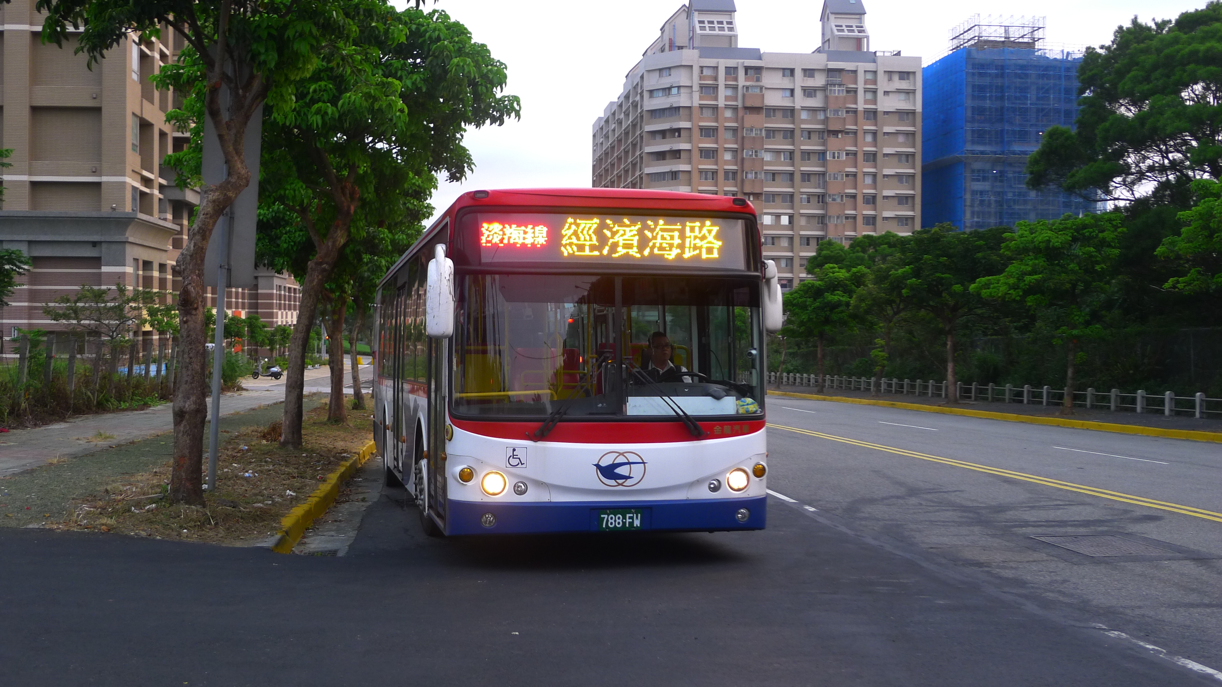 中文（台灣）: 淡水客運金龍汽車KL6112U1低底盤公車788-FW行駛台北捷運淡海線先導公車。